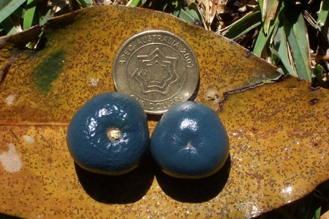 Elaeocarpus sedentarius - fruit